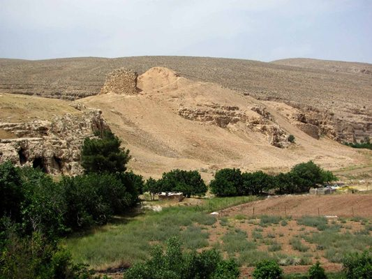 تصویر گرفته شده از قصرابونصر